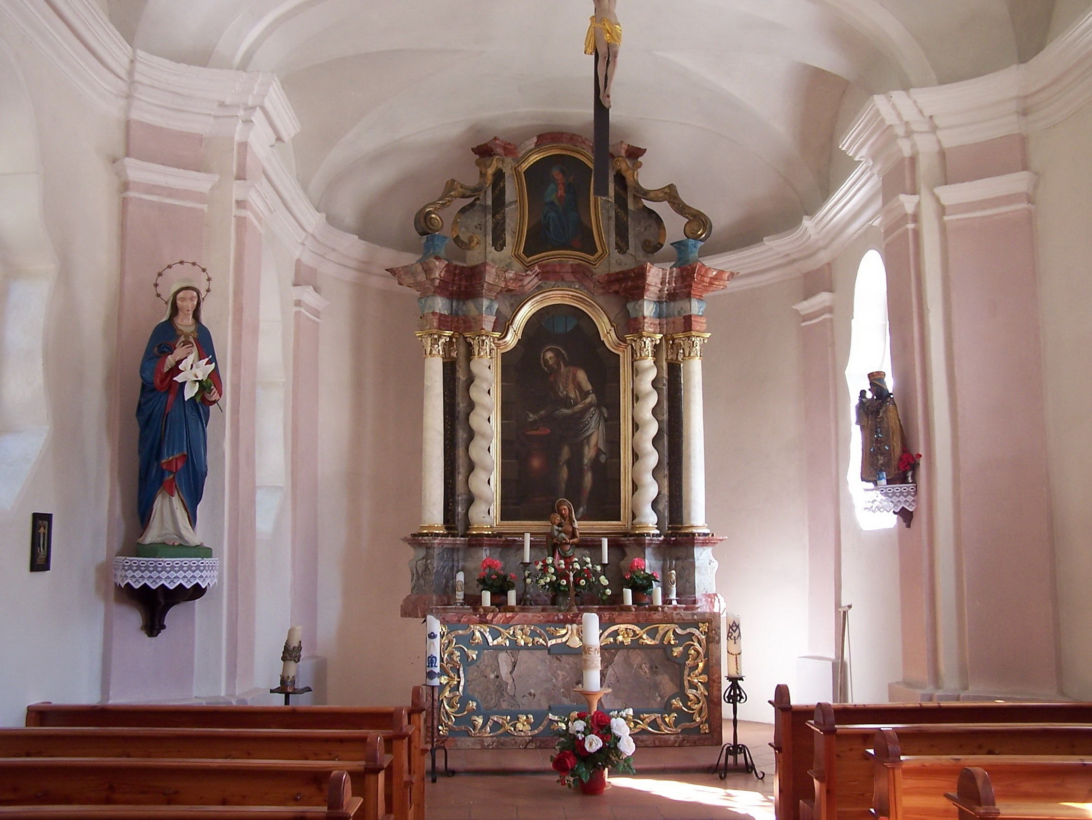 Essenbach, Hauptteilholz. Im Wald zwischen Oberröhrenbach und Mettenbach. Kapelle 'Zum Herrgott auf der Wies'. Kleiner Saalbau mit eingezogenem Chor. Barocke Anlage von 1754, mit Lisenen- und Putzgliederung. Im eingezogenen Chor Tonnengewölbe mit Stichkappen.